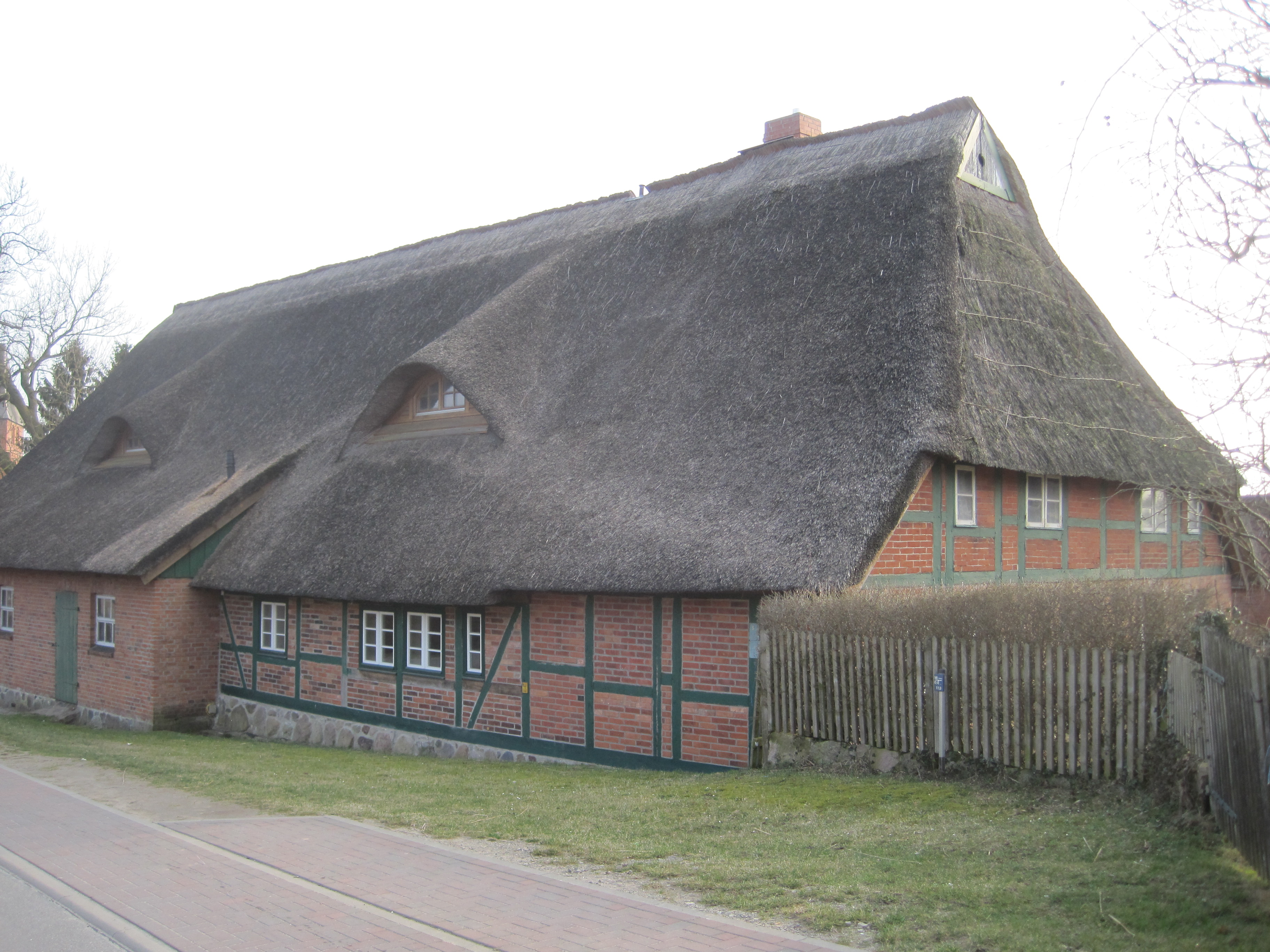 Bauernhaus Bäckerberg 5 in Schlagsdorf